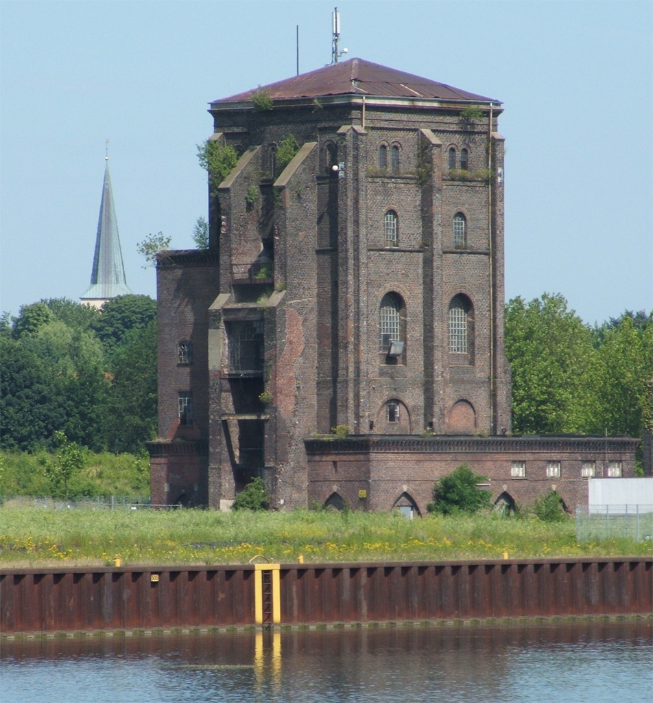 Beschreibung : Die ehemalige Zeche Fürst Hardenberg in Dortmund Fotograf : Gerd W. Schmölter Datum : 03. Juli 2005 Lizenz